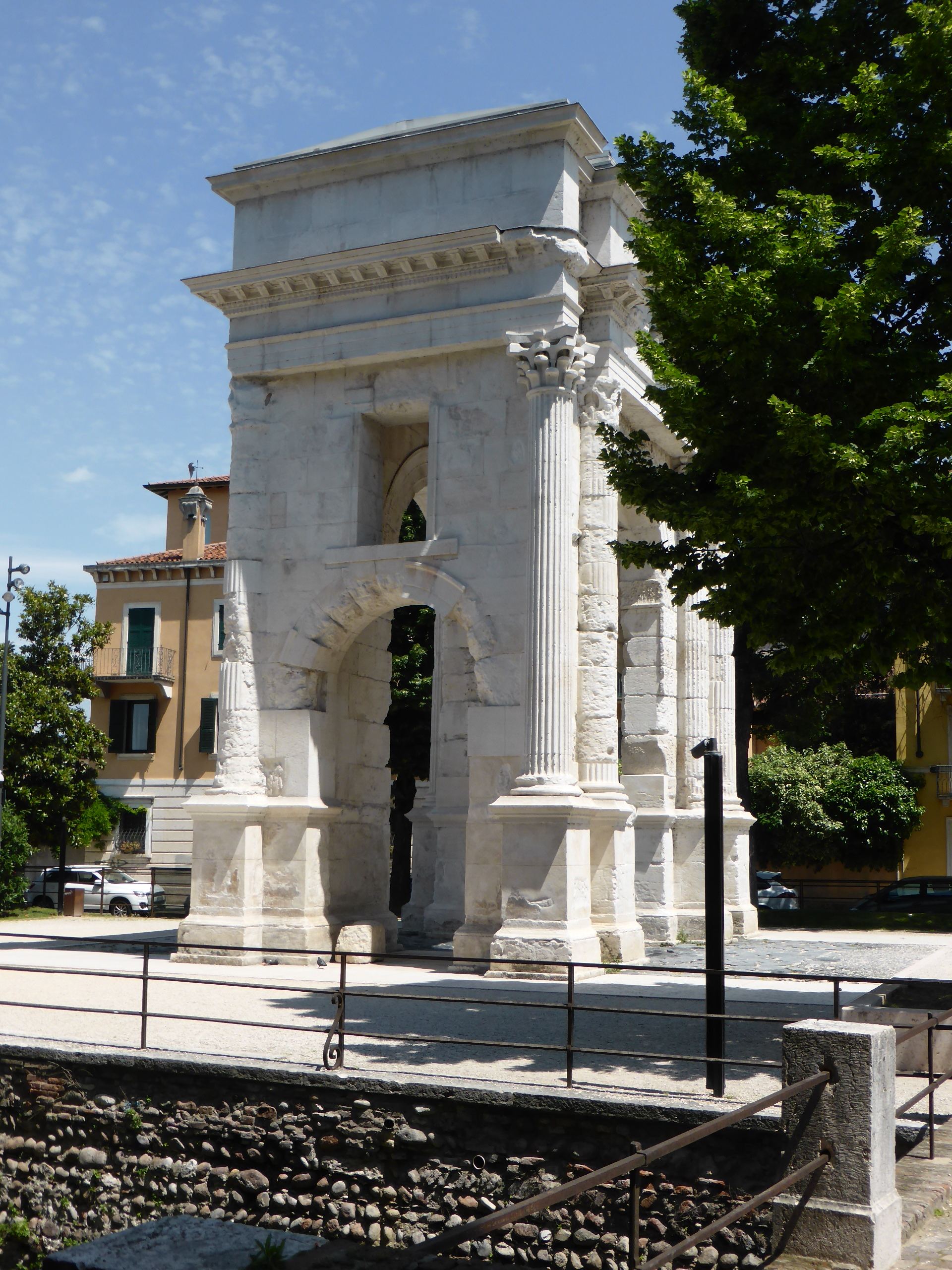 Seitenansicht Arco dei Gavi